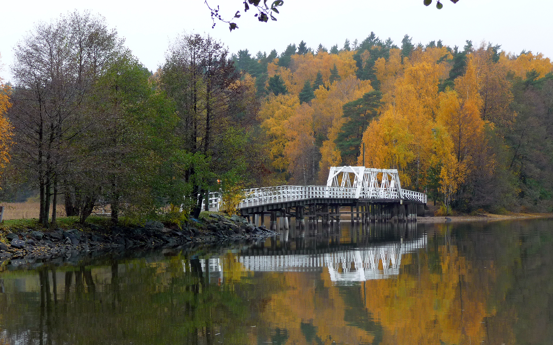 Liessaari Bridge, Lohja